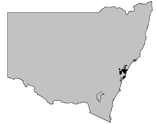 Domaine de répartition de Pseudophryne australis